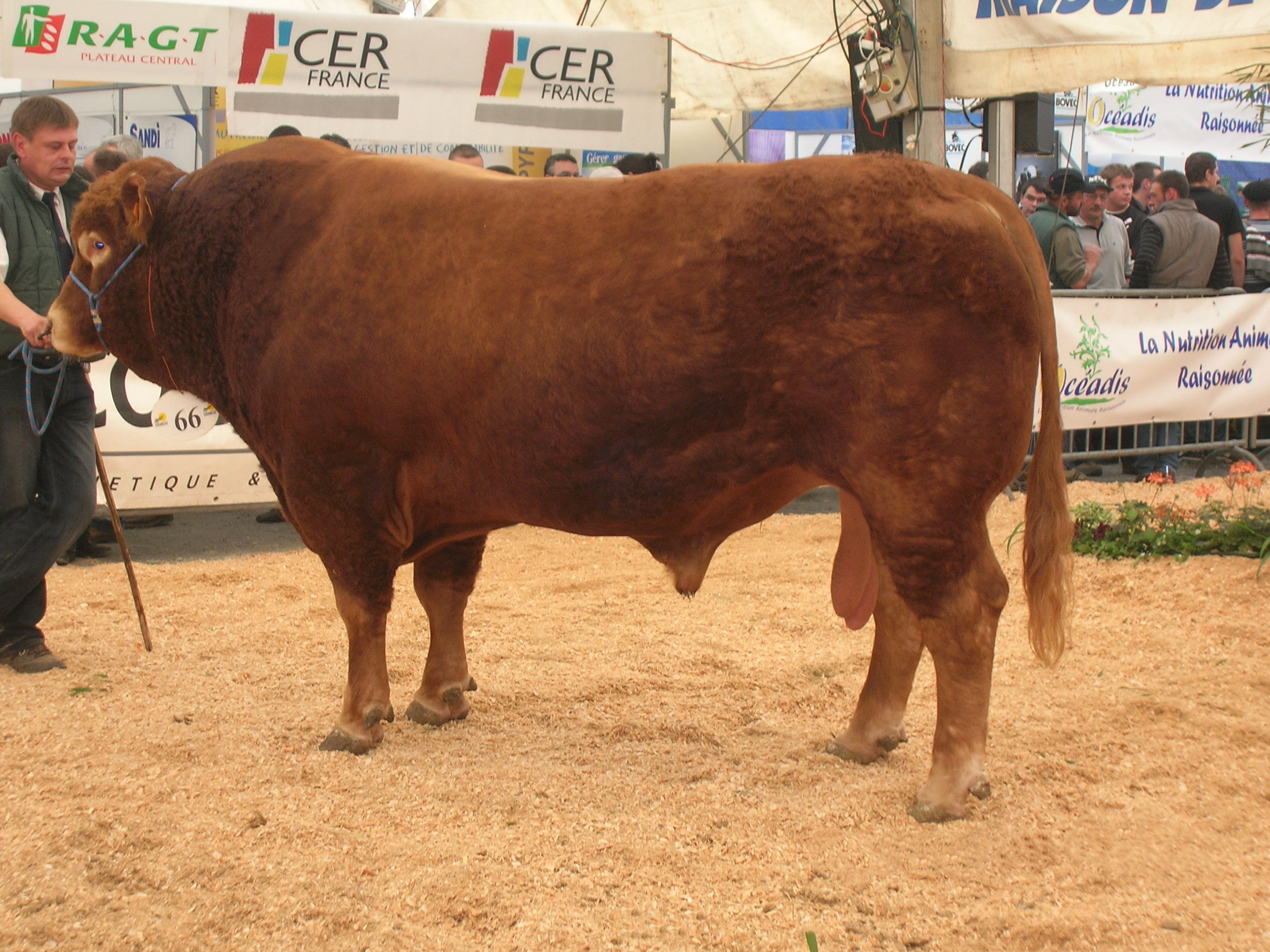 Taureau de race limousine au concours bovin de la foire agricole de Réalmont.